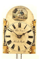 Eine Lackschild-Uhr. Normalgroße Wanduhren, wie sie im 19. Jahrhundert gebaut wurden. Kunstfertige Schildmaler ließen hier wirkliche Kunstwerke entstehen. Der Großteil der Uhrenproduktion im Schwarzwald entfielen vor allem in der ersten Jahrhunderthälfte auf diesen Uhrentyp. So wurden die Uhren mit handbemaltem, lackiertem Holzschild, Schlagwerk und später mit Kuckucksruf zu einem Markenzeichen der Uhrmacherei des Schwarzwaldes.